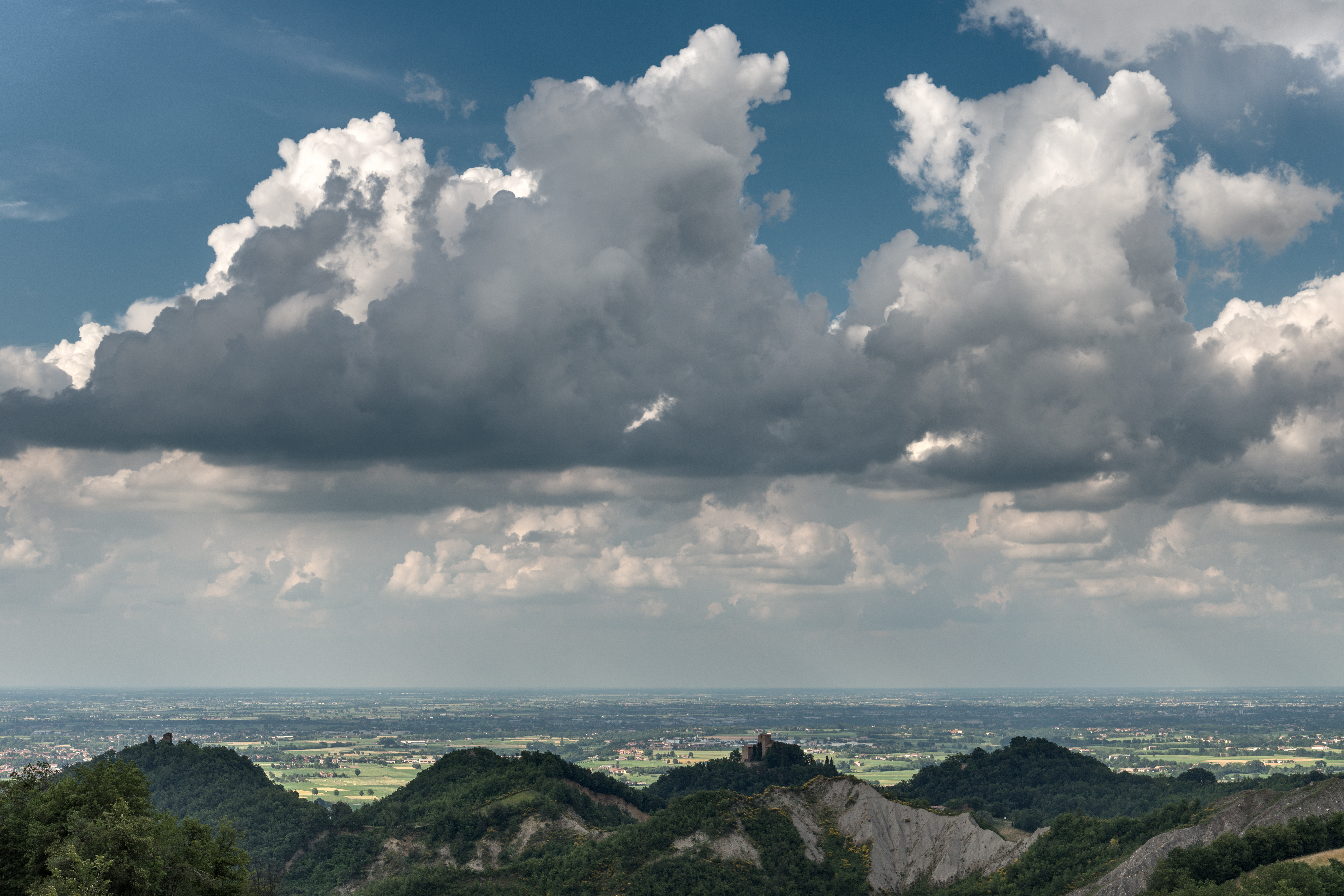 Castello di Bianello - Quattro Castella, Reggio Emilia, Italia